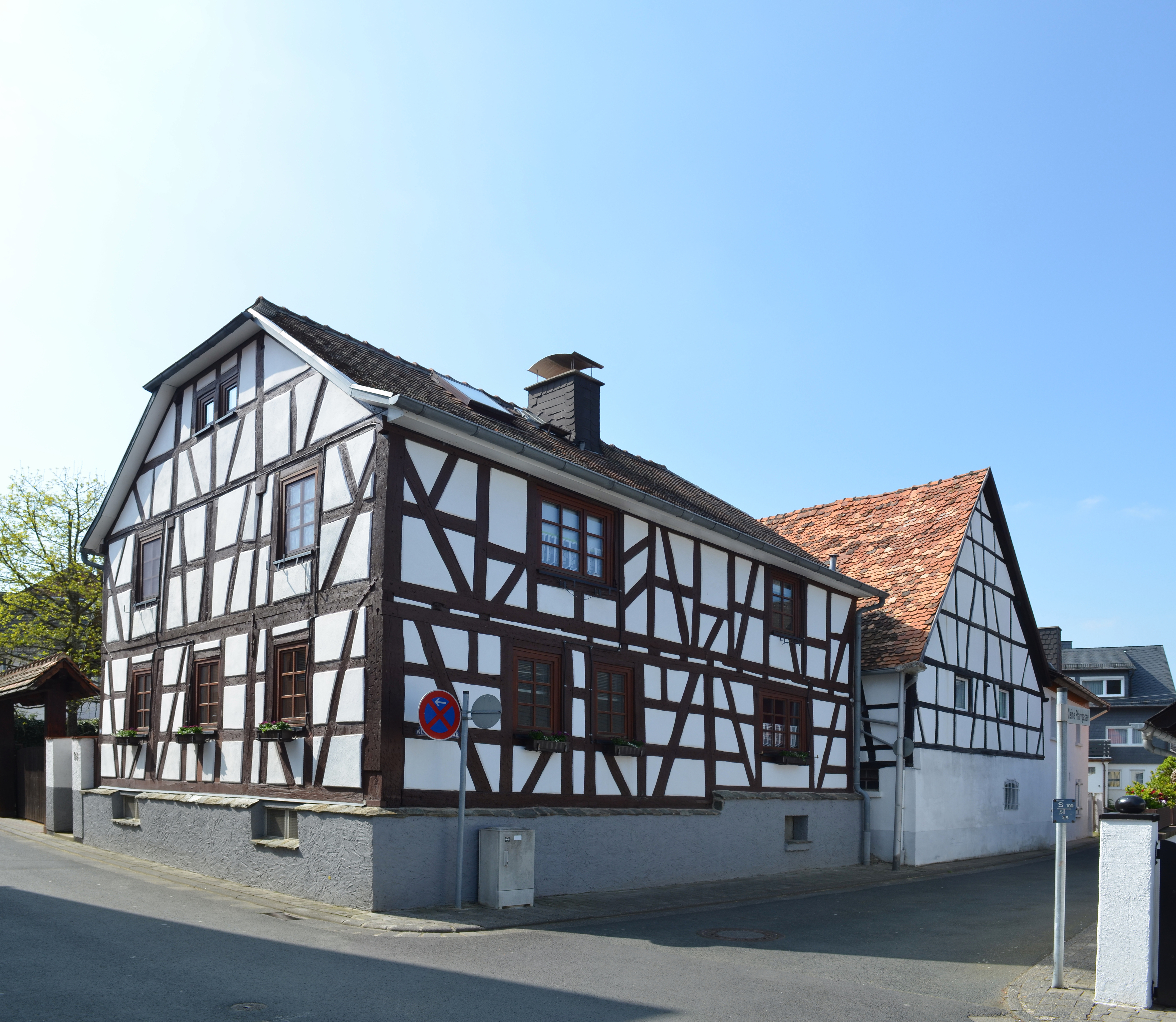 Anspach, Pfargasse 10